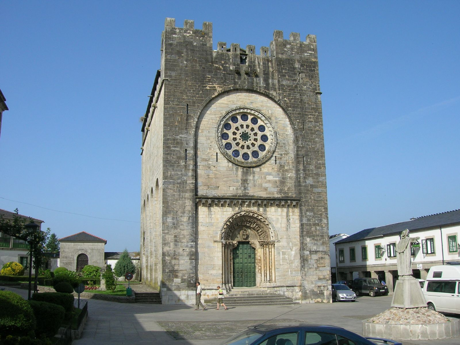 La iglesia fortaleza de San Nicolao de Portomarín, fue trasladada piedra a piedra desde su anterior ubicación, para salvarse de ser sumergida en las aguas del río Miño, por la construcción del embalse de Belesar.